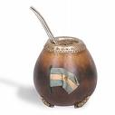 el gran premio matienso